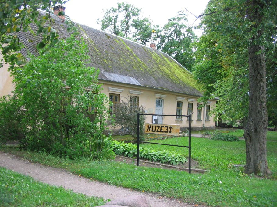 Džukstes pasaku muzejs Lanceniekos